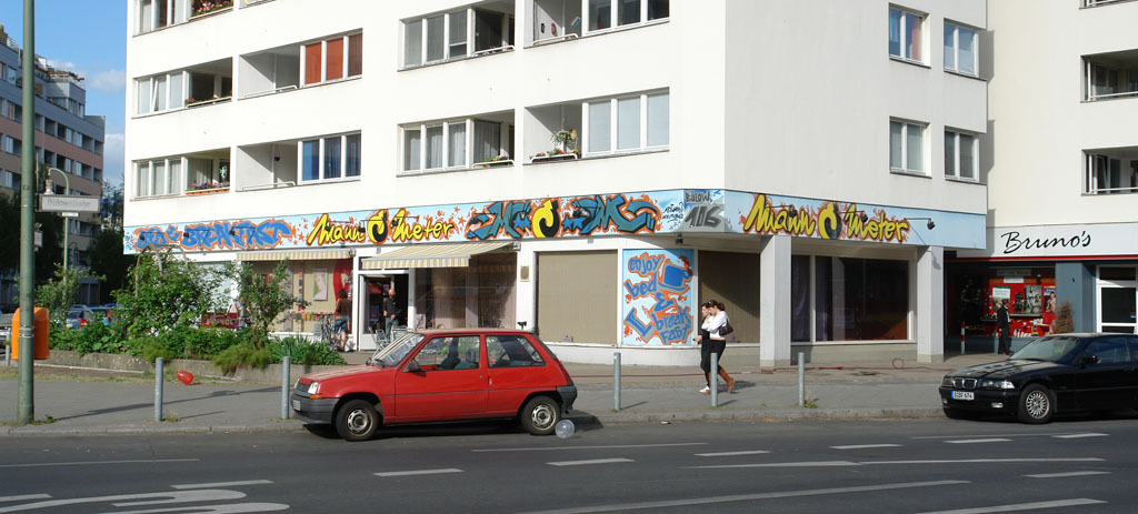 Der heutige Sitz des Mann-O-Meter e.V. in der Berliner Bülowstraße 106